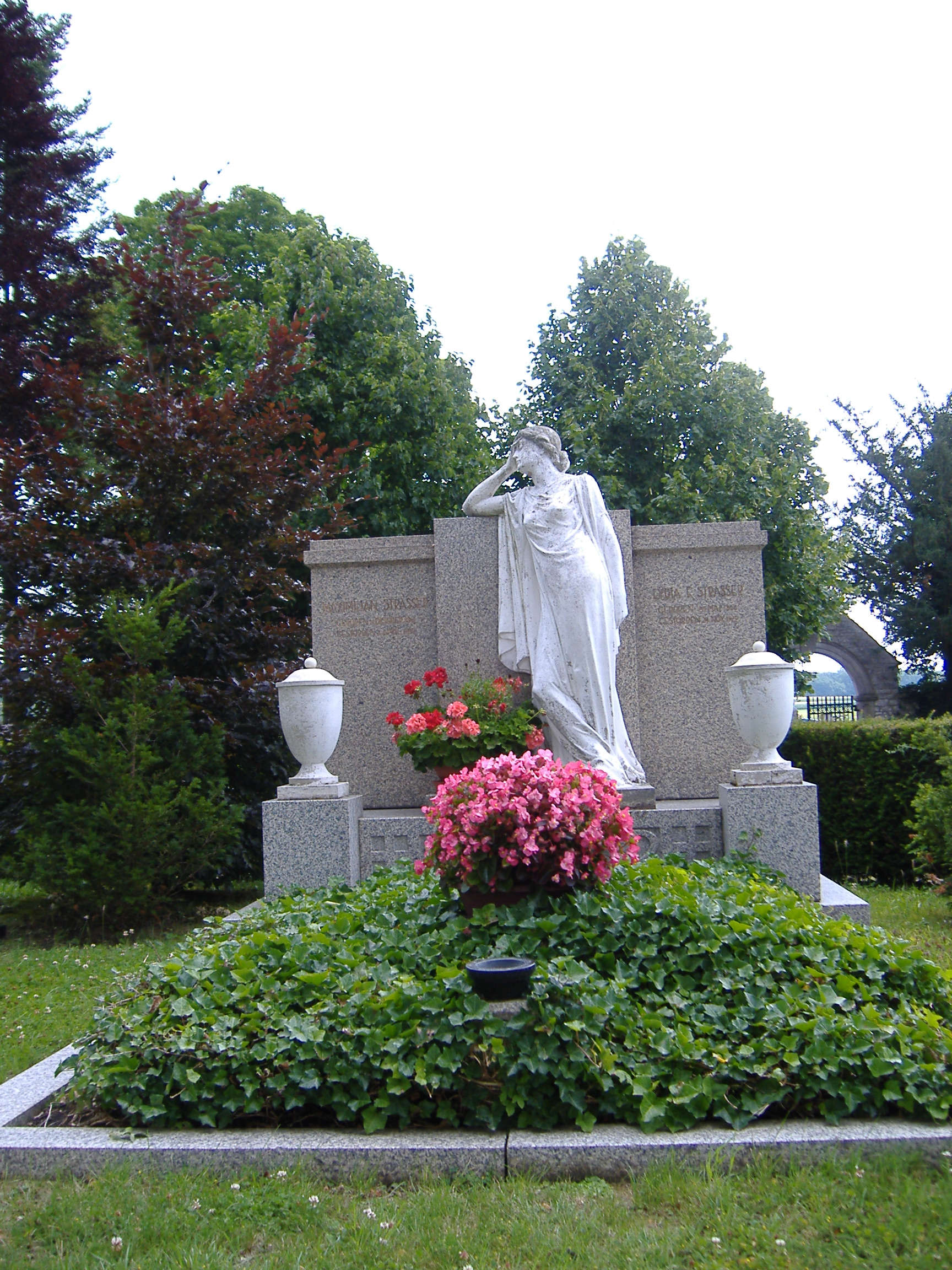 Grabstääte von Maximilian Straßer